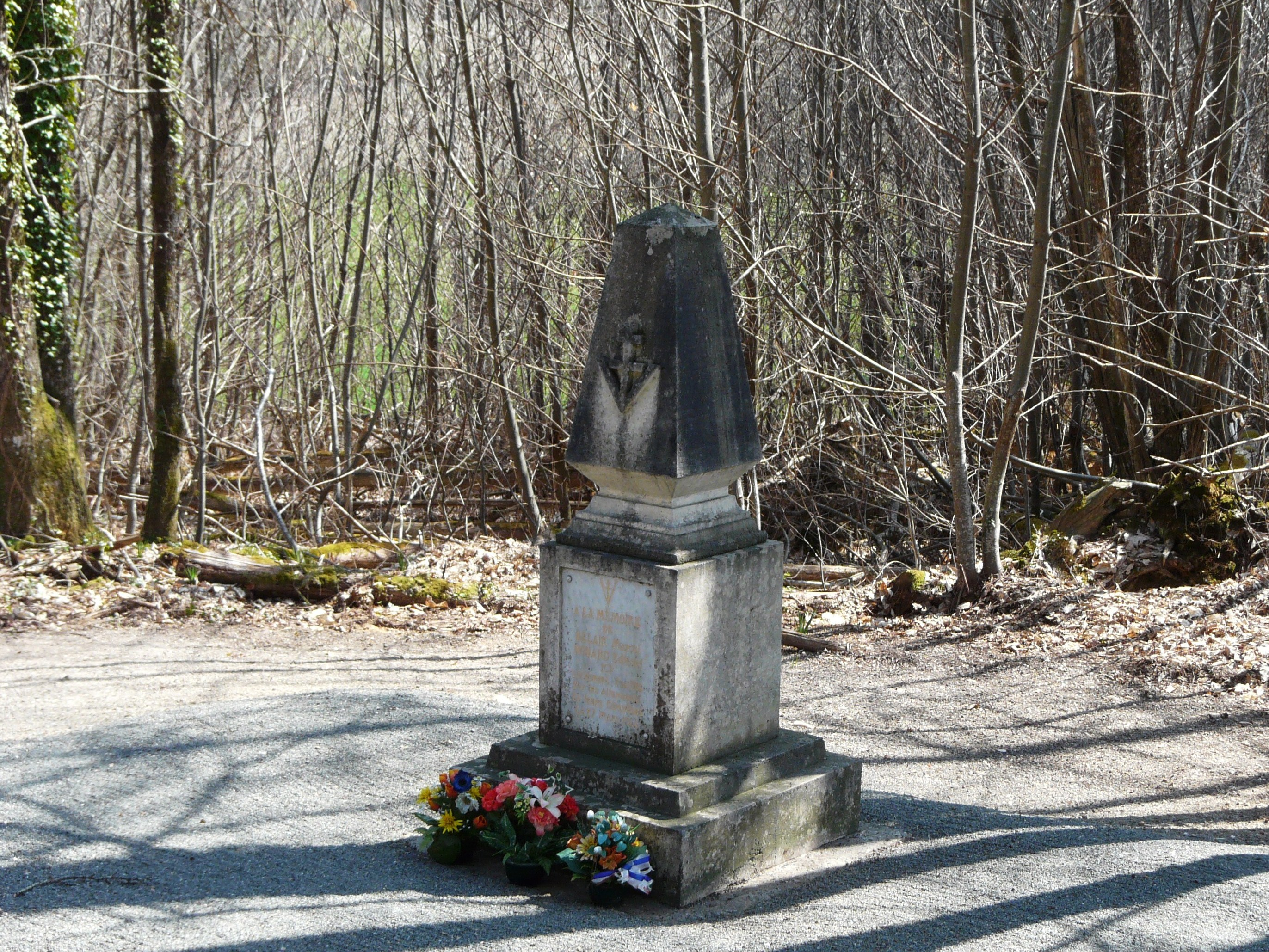 En bordure de la route départementale 98, stèle à la mémoire de deux personnes fusillées par les Allemands le 27 mars 1944, Saint-Pancrace, Dordogne, France.